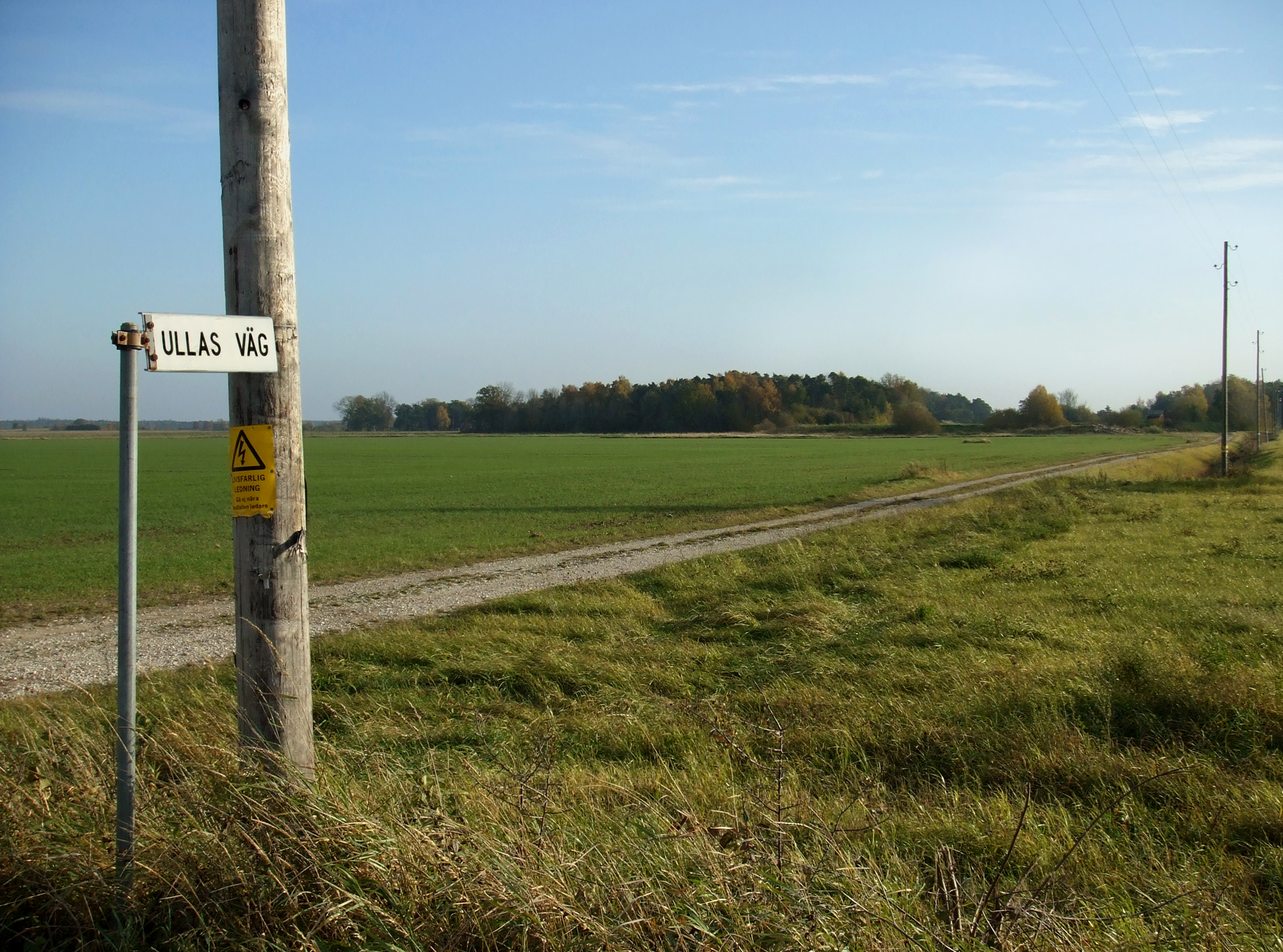 Ullas väg i Barlingbo, Gotland, Sverige